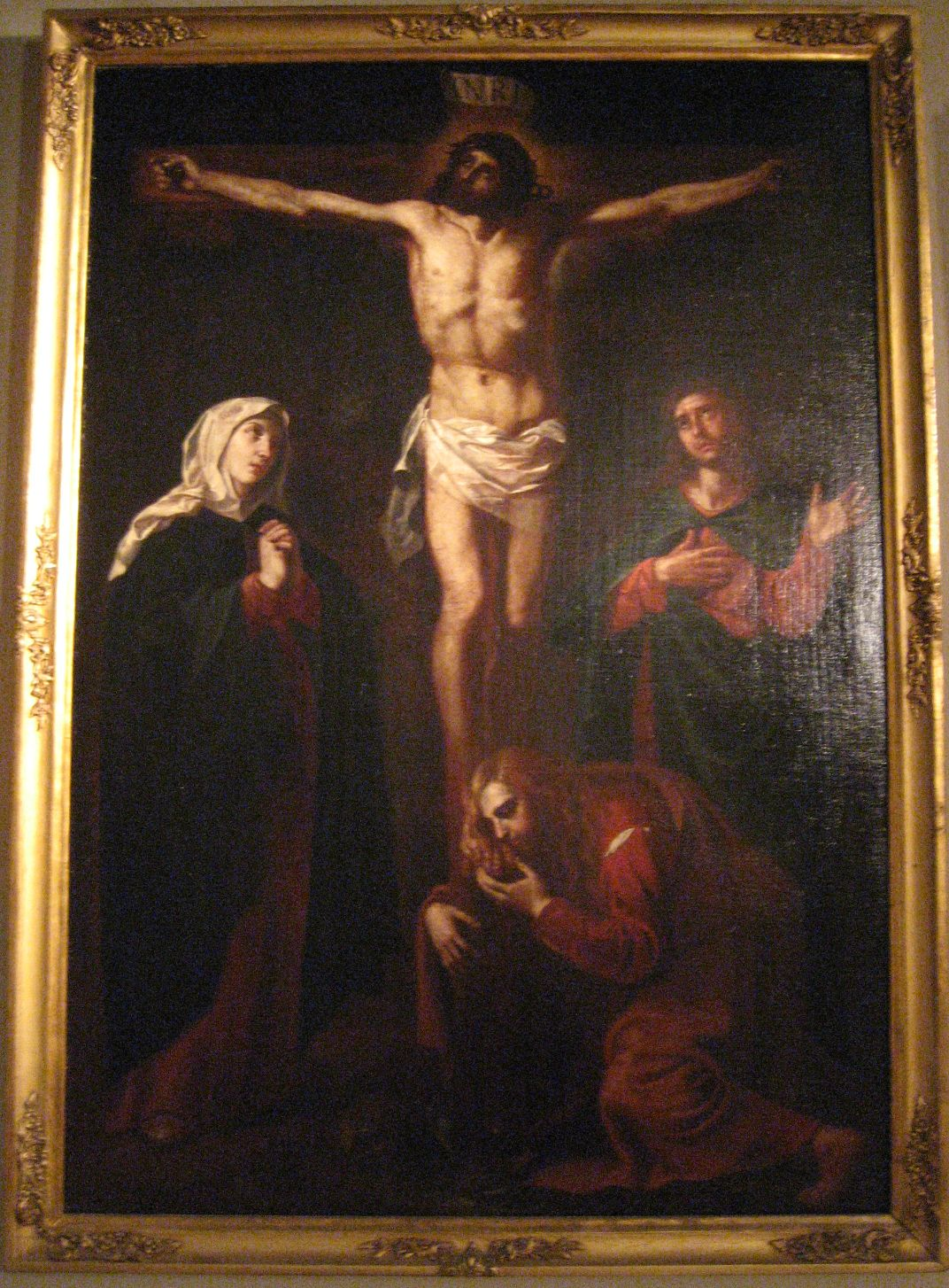 Crucifixió. pintura sobre tela. Biblioteca Museu Víctor Balaguer